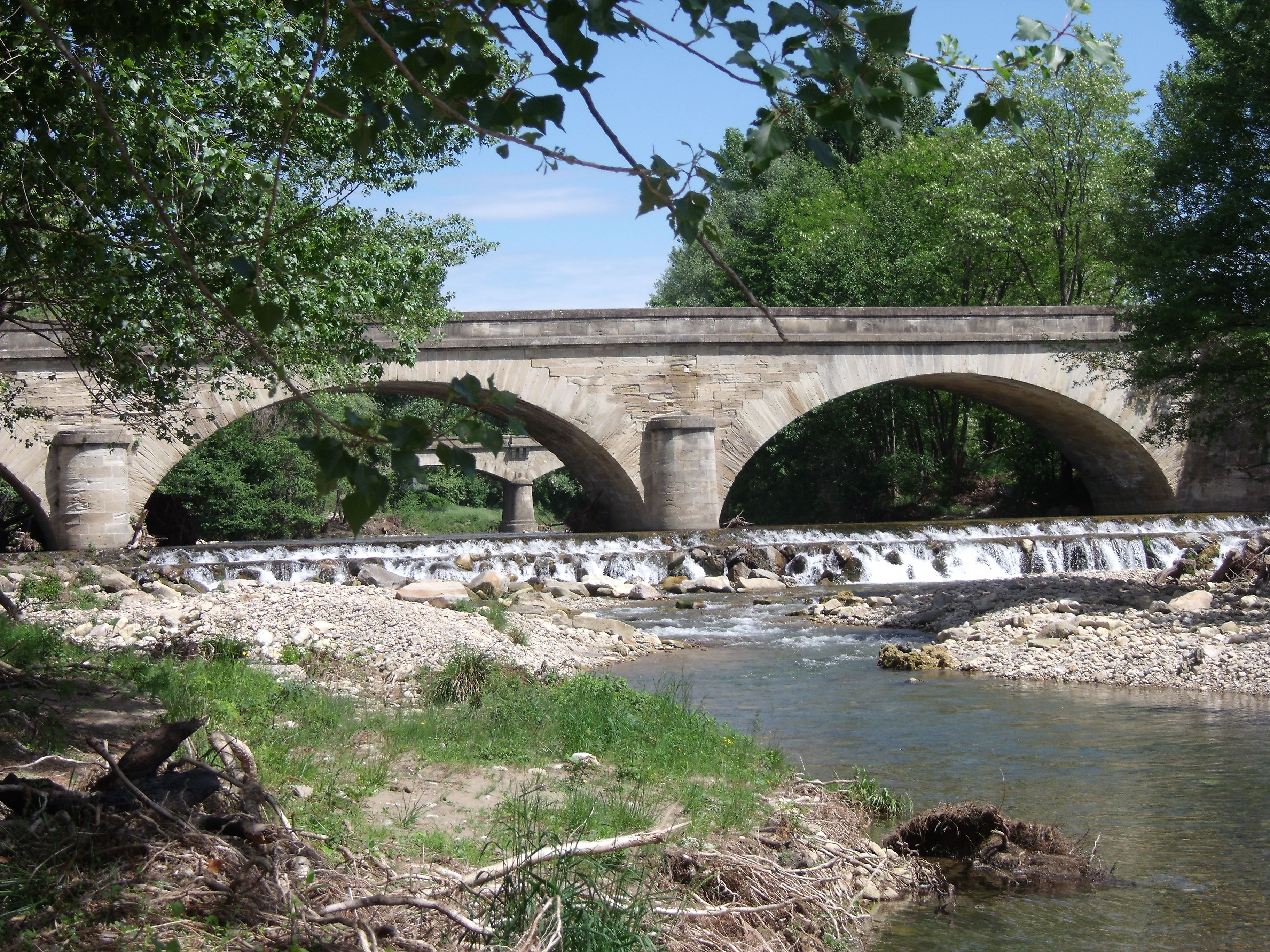 Photo prise en mai 2015,la où je pêchais quand ,j'étais enfant